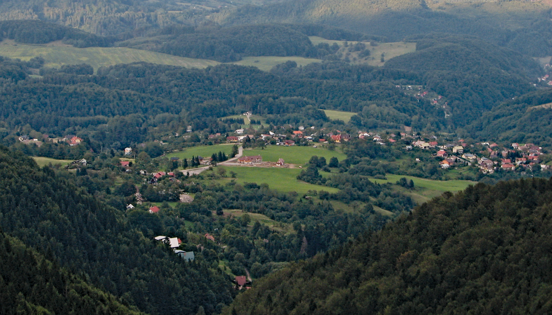 widok na Králiky od północnego wschodu, prawdopodobnie z okolic góry Skalka (1232 m)